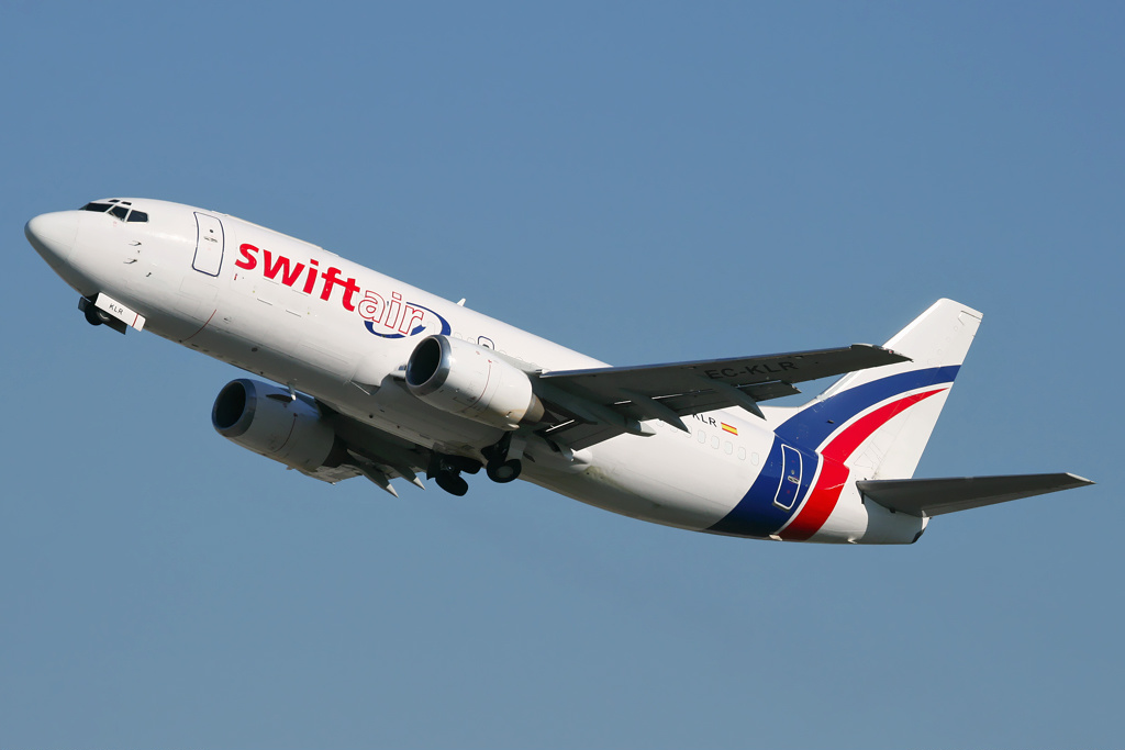 EC-KLR (cn 23766/1375) taking off from Lisbon (- Portela de Sacavem / AT1 / AB1) (LIS / LPPT)